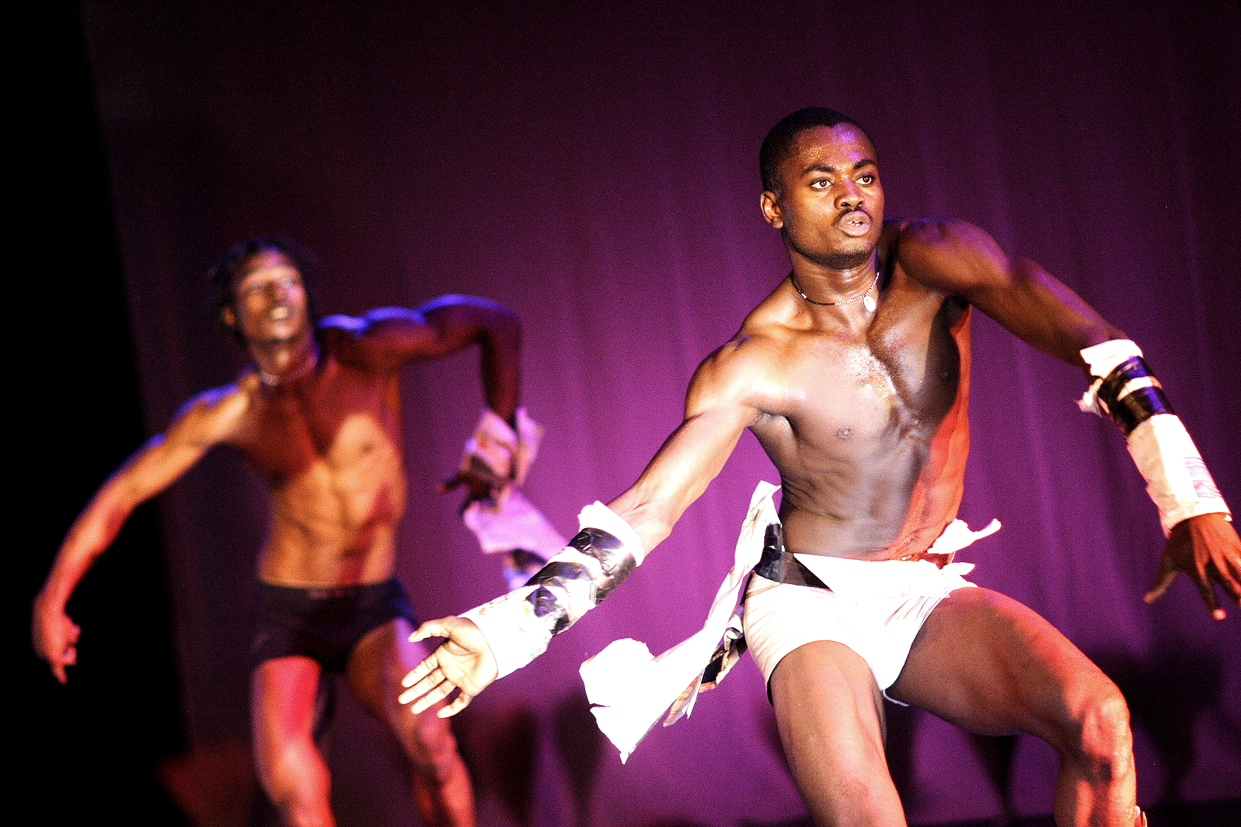 Ballet "Le Sacre du Tempo" 2008